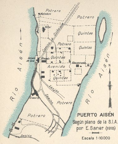 Puerto Aisén nach dem Plan der S.I.A. von E. Baner (1918)